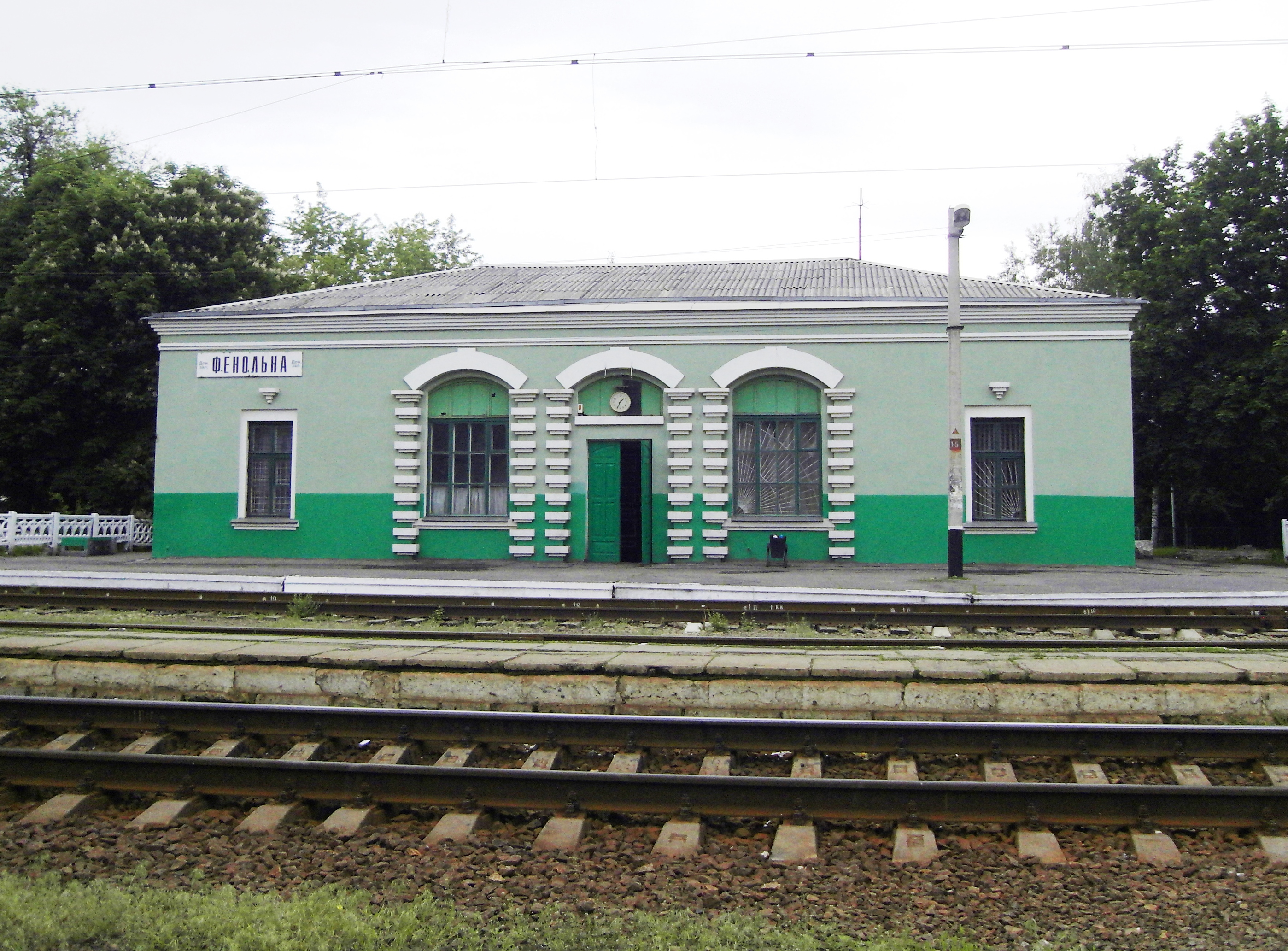 Станція Фенольна